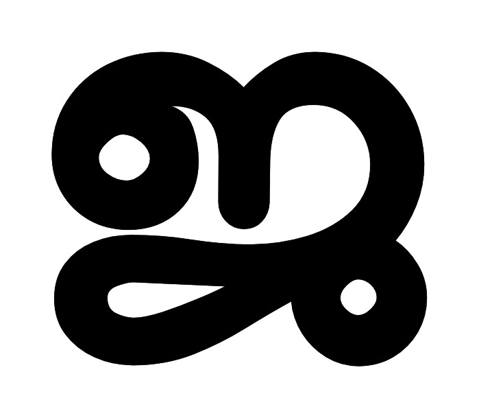 ജ മലയാളം അക്ഷരം